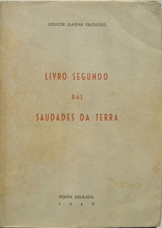 Doutor Gaspar Frutuoso, Saudades da Terra, Livro II, com Palavras prévias de João Bernardo de Oliveira Rodrigues, Instituto Cultural de Ponta Delgada, Açores, 1968.